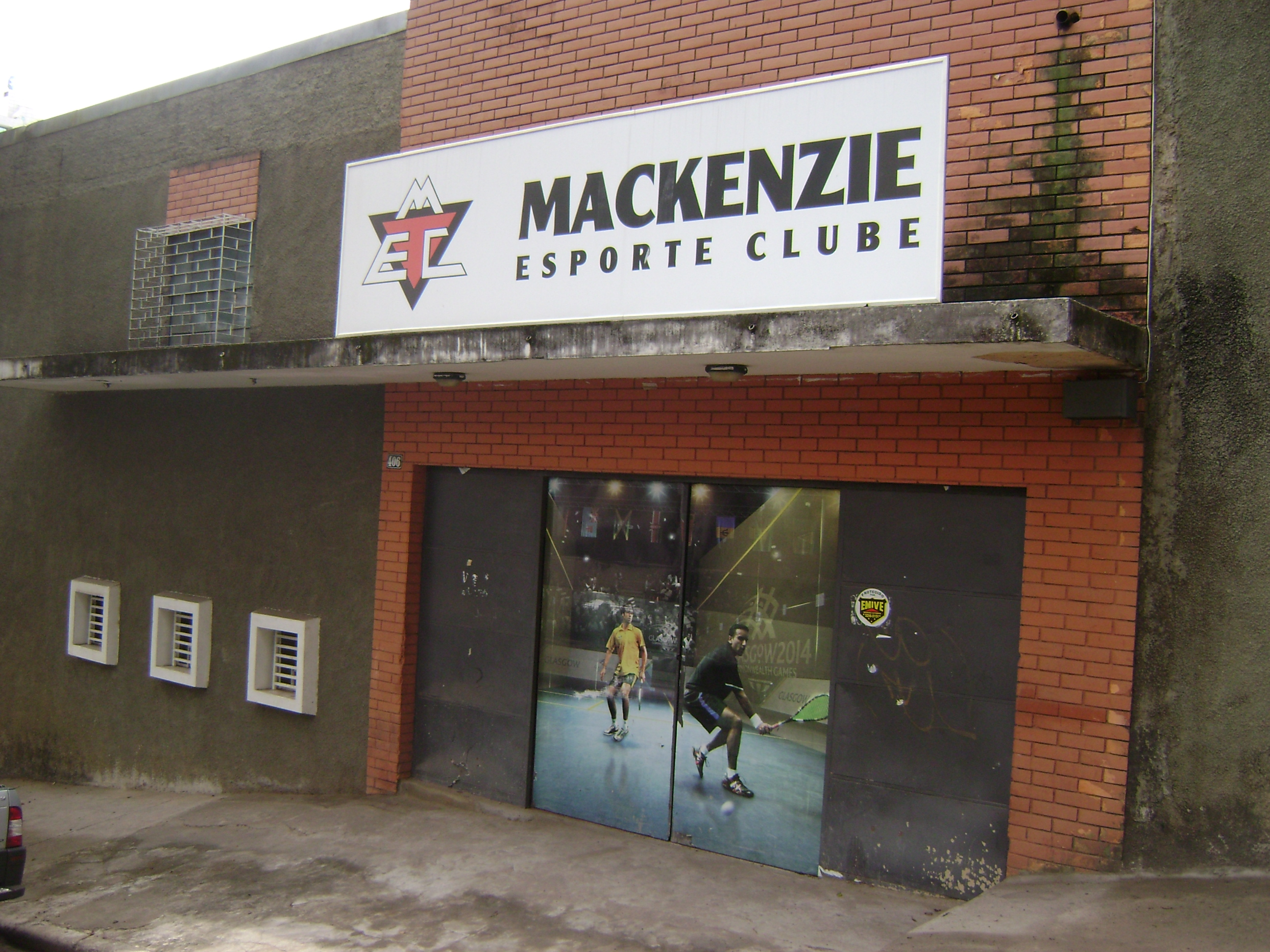 Entrada do Mackenzie em Belo Horizonte.